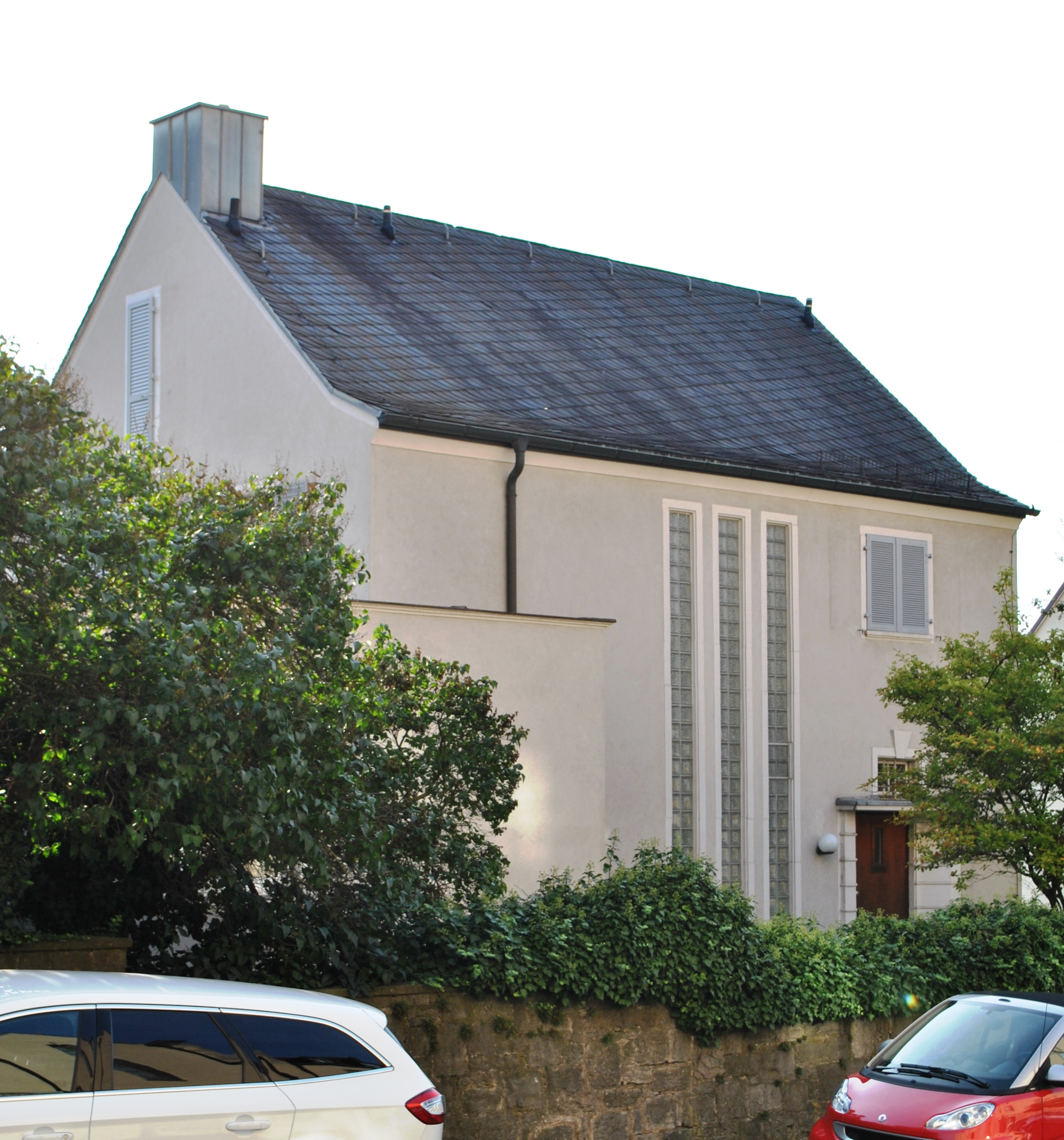 Villa Zweigeschossiger Satteldachbau, Putzfassade mit dominierender dreiteiliger Fensterbahn zur Treppenhausbelichtung, Neue Sachlichkeit, Albert Boßlet, 1928This is a photograph of an architectural monument.